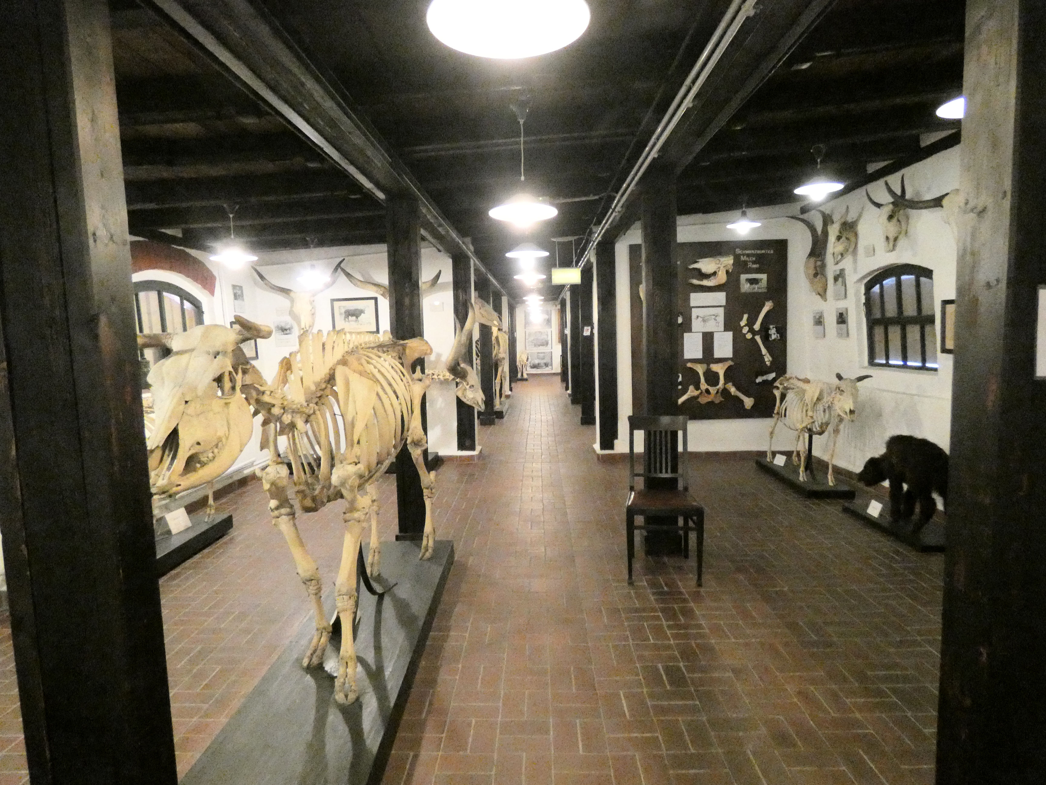 Museum für Haustierkunde "Julius Kühn", Halle (Saale)